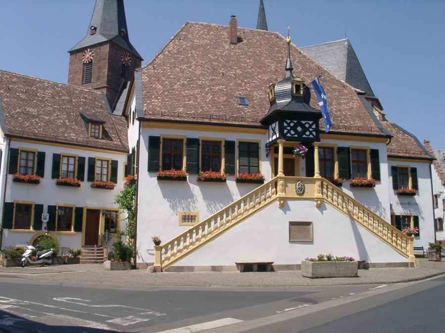 Das Deidesheimer Rathaus nach Abschluss der Renovierungsarbeiten